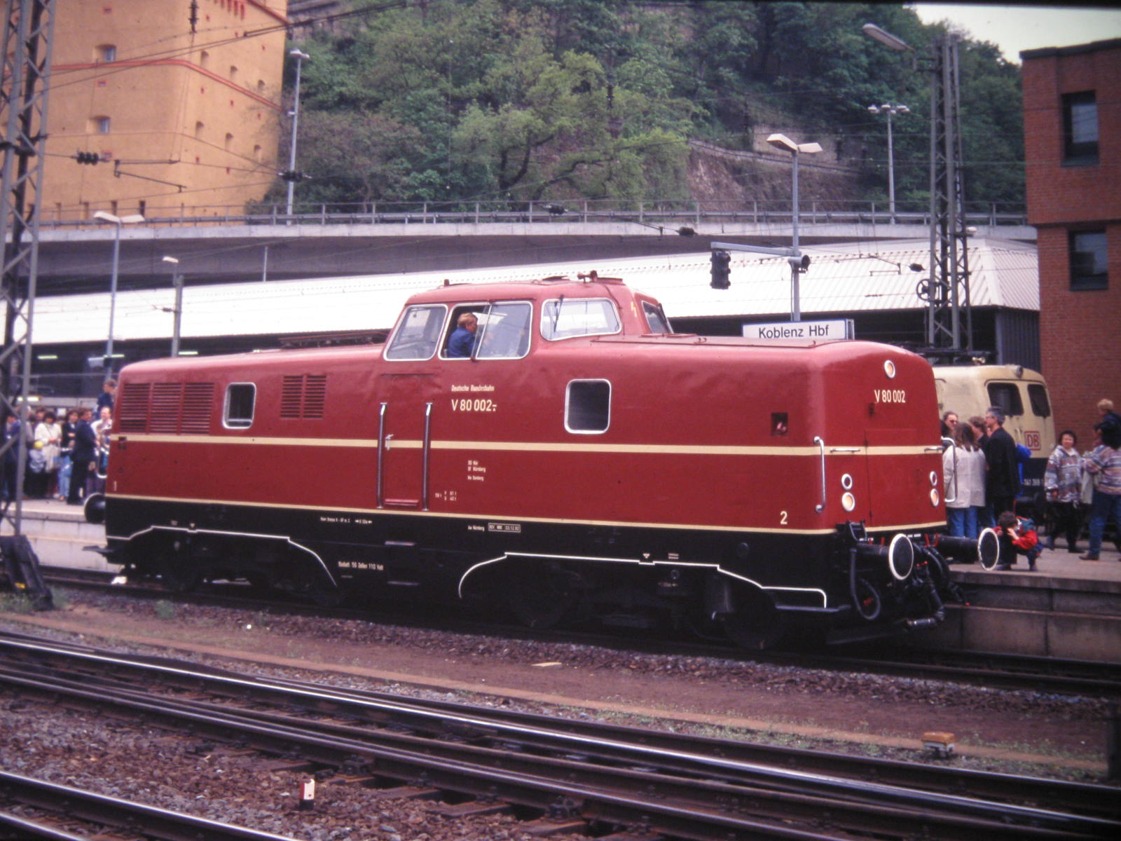 DB Baureihe V80 als Museumslok in Koblenz Hbf